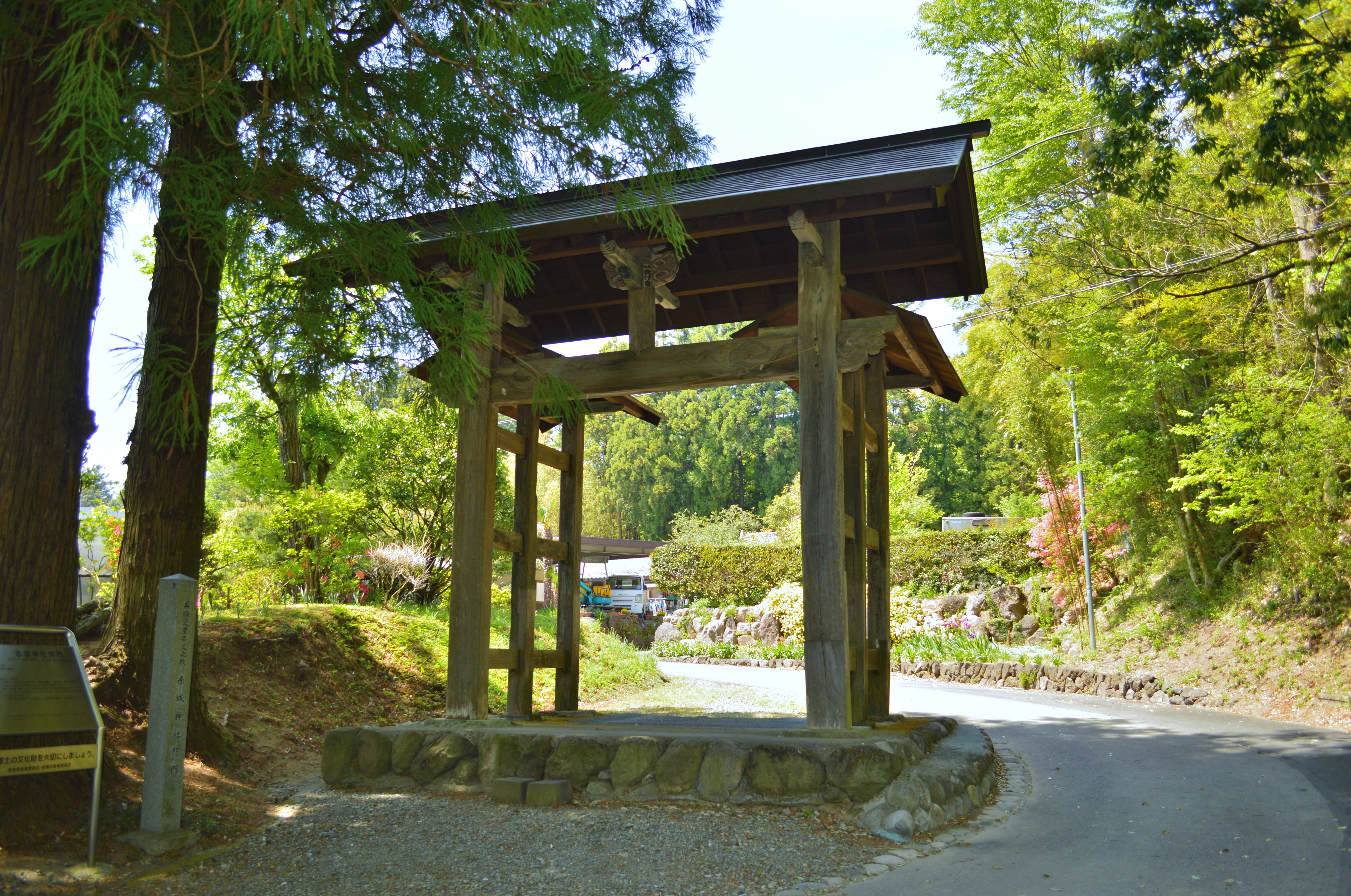 赤城神社 (前橋市三夜沢町) 惣門